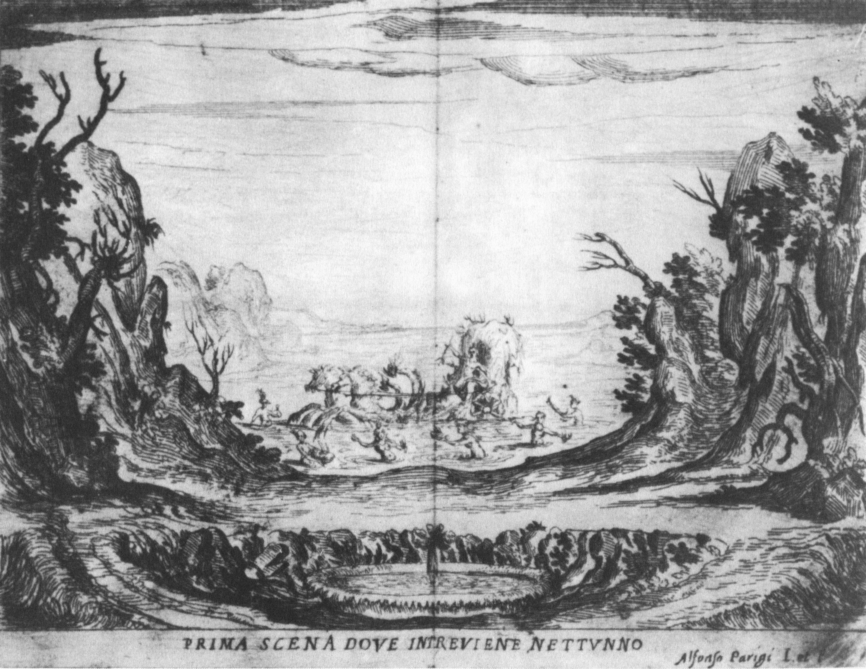 Francesca Caccini - La liberazione di Ruggiero dall'isola d'Alcina - Prima scena dove intreviene Nettunno - Seascape with Neptune's chariot (Prologue)